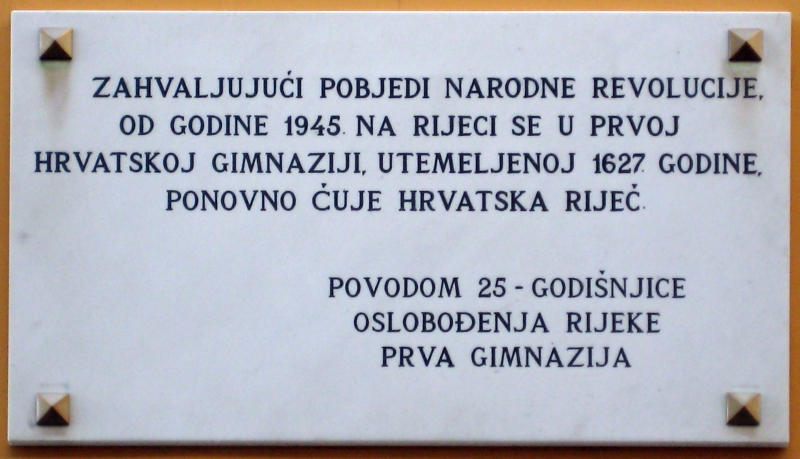 spomen ploča na Prvu hrvatsku gimnaziju u Rijeci, Frana Kurelca 1, Rijeka